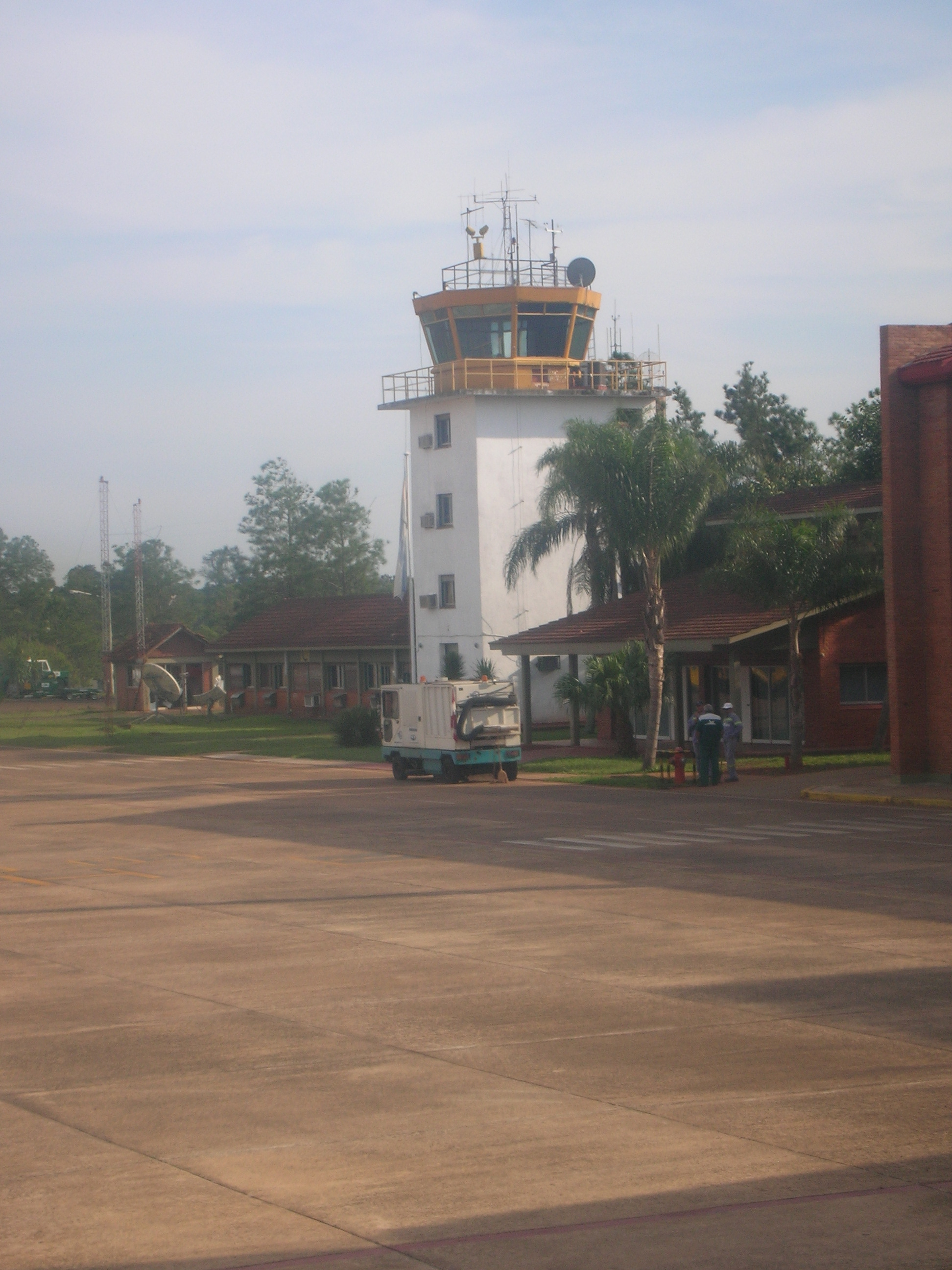 Torre de control del aeropuerto de Iguazu